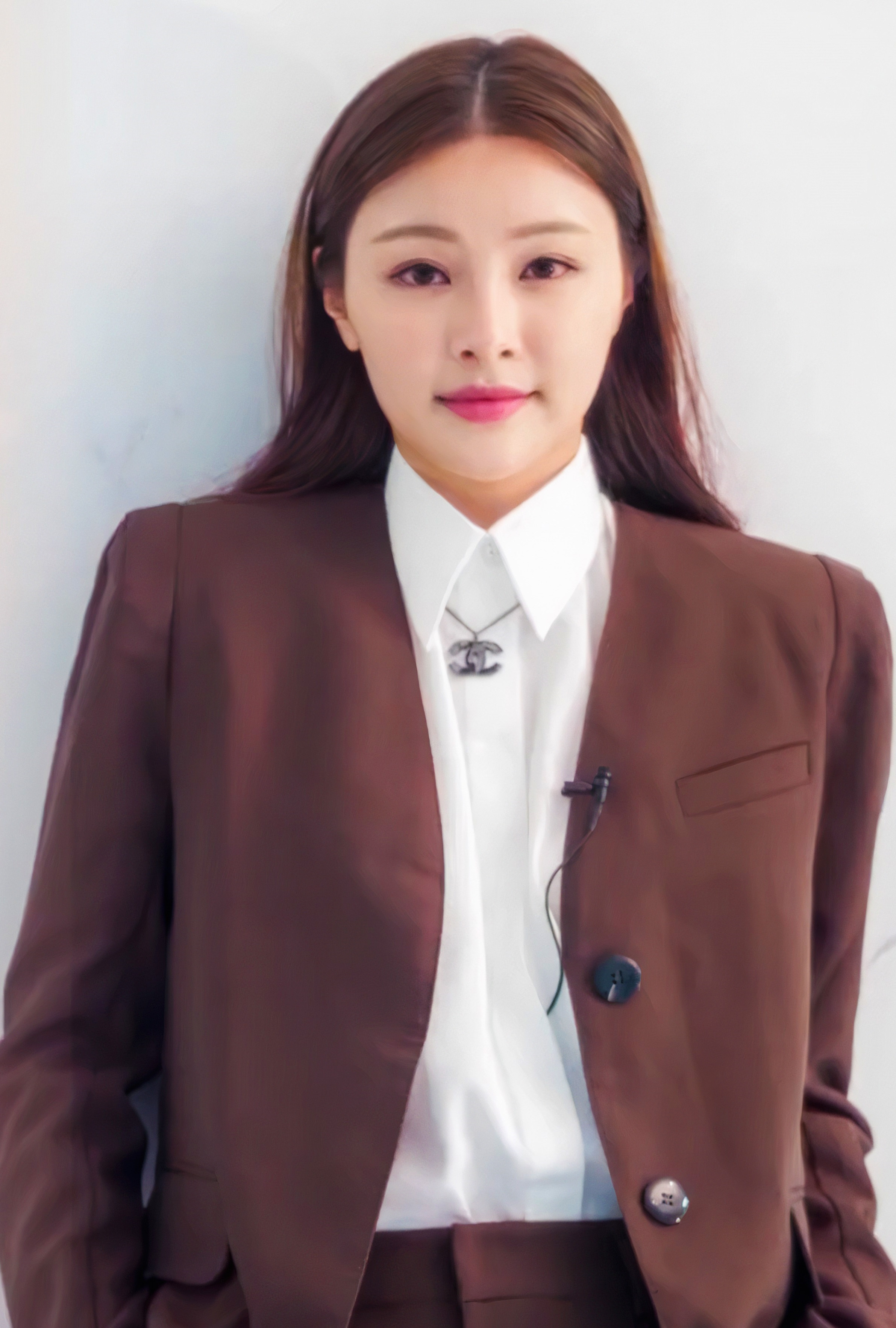 中文（香港）: 2012年出道的香港粵語歌手，曾奪得多個音樂獎項，2016年嘗試往北京發展，2019年7月初則成為無綫電視經理人合約藝人